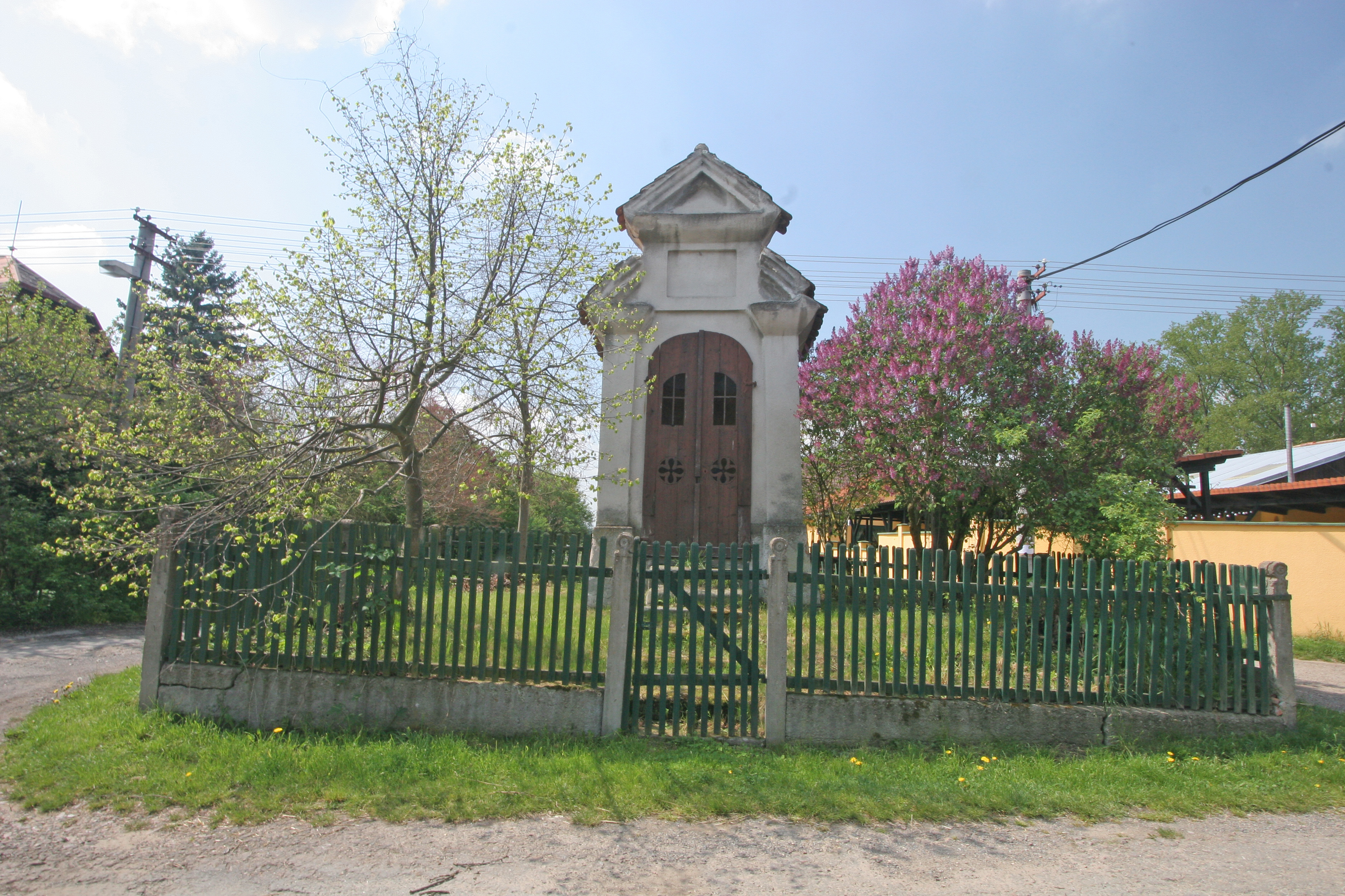 Počaply výklenková kaple